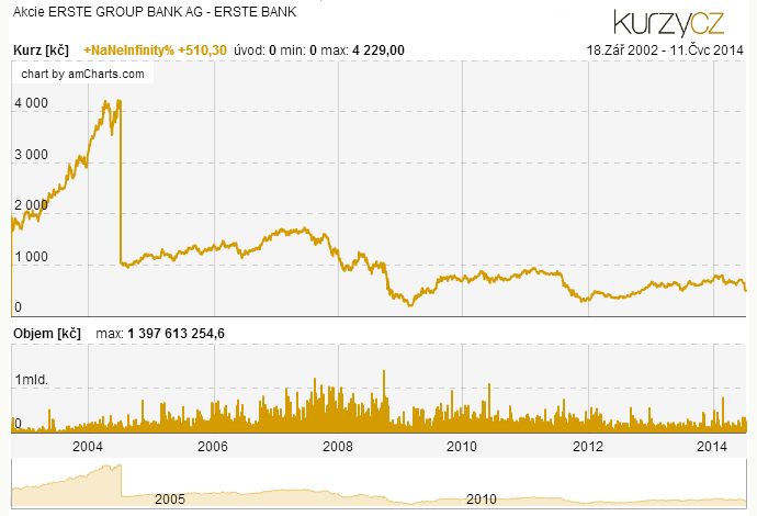 Akcie ERSTE GROUP BANK - Graf vývoje kurzu na Burze Praha.